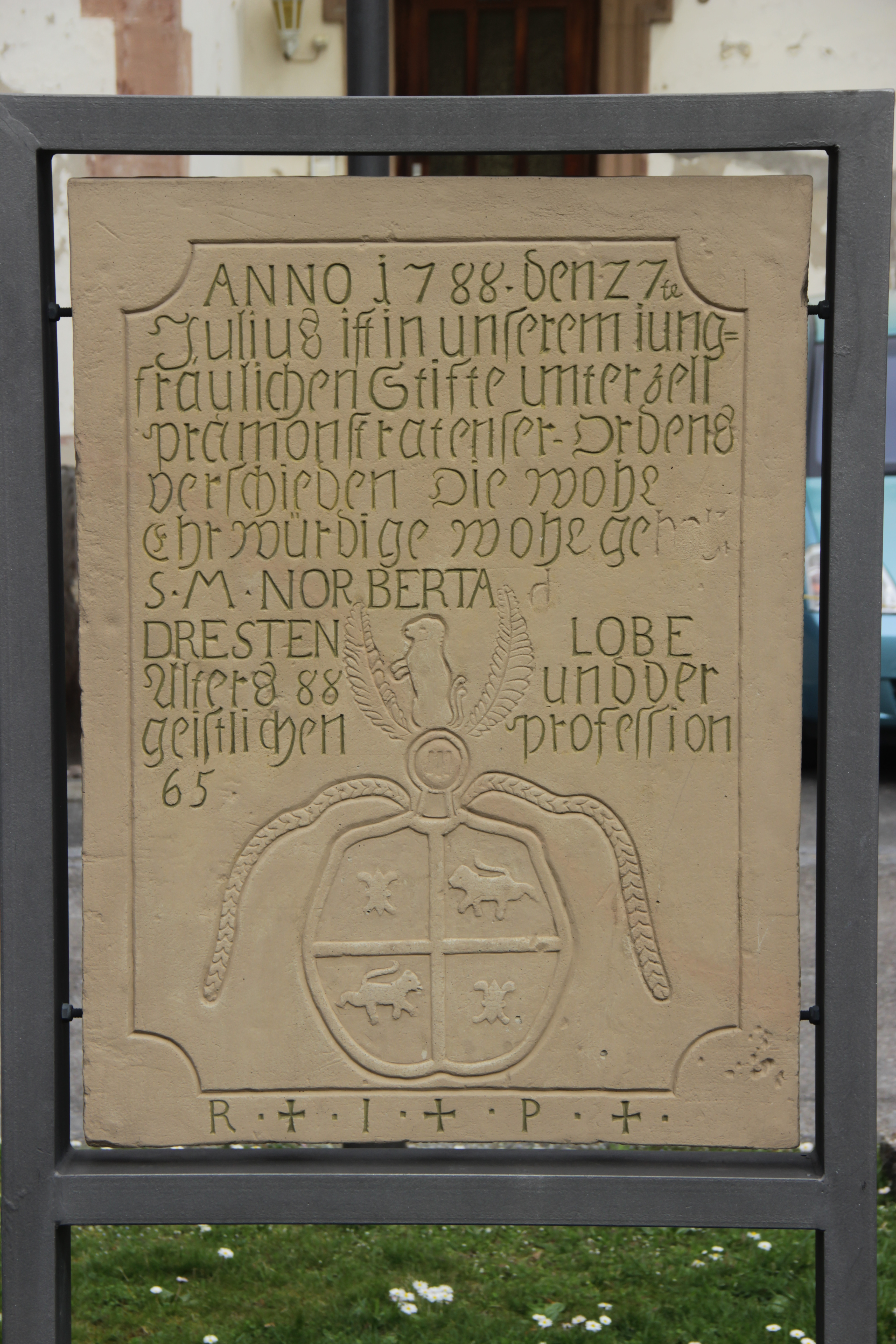 Grabstein